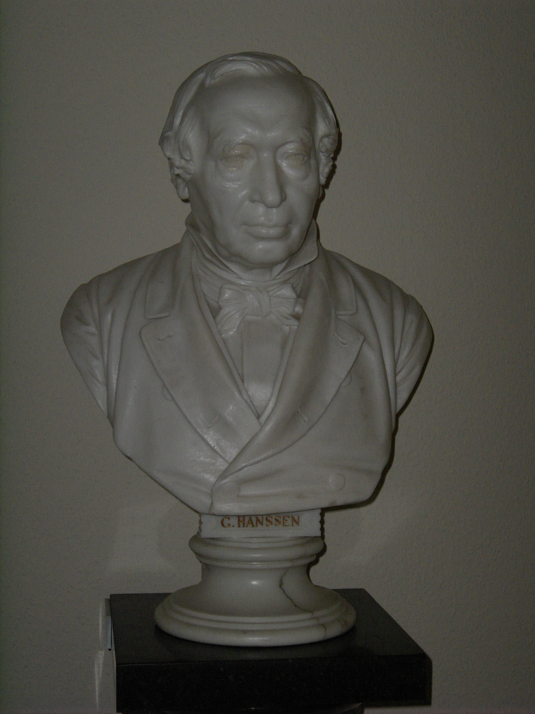 Büste des Nationalökonomen Georg Hanssen (1809-1894). Die Büste wurde 1887 von Carl Ferdinand Hartzer (1838-1906) geschaffen.